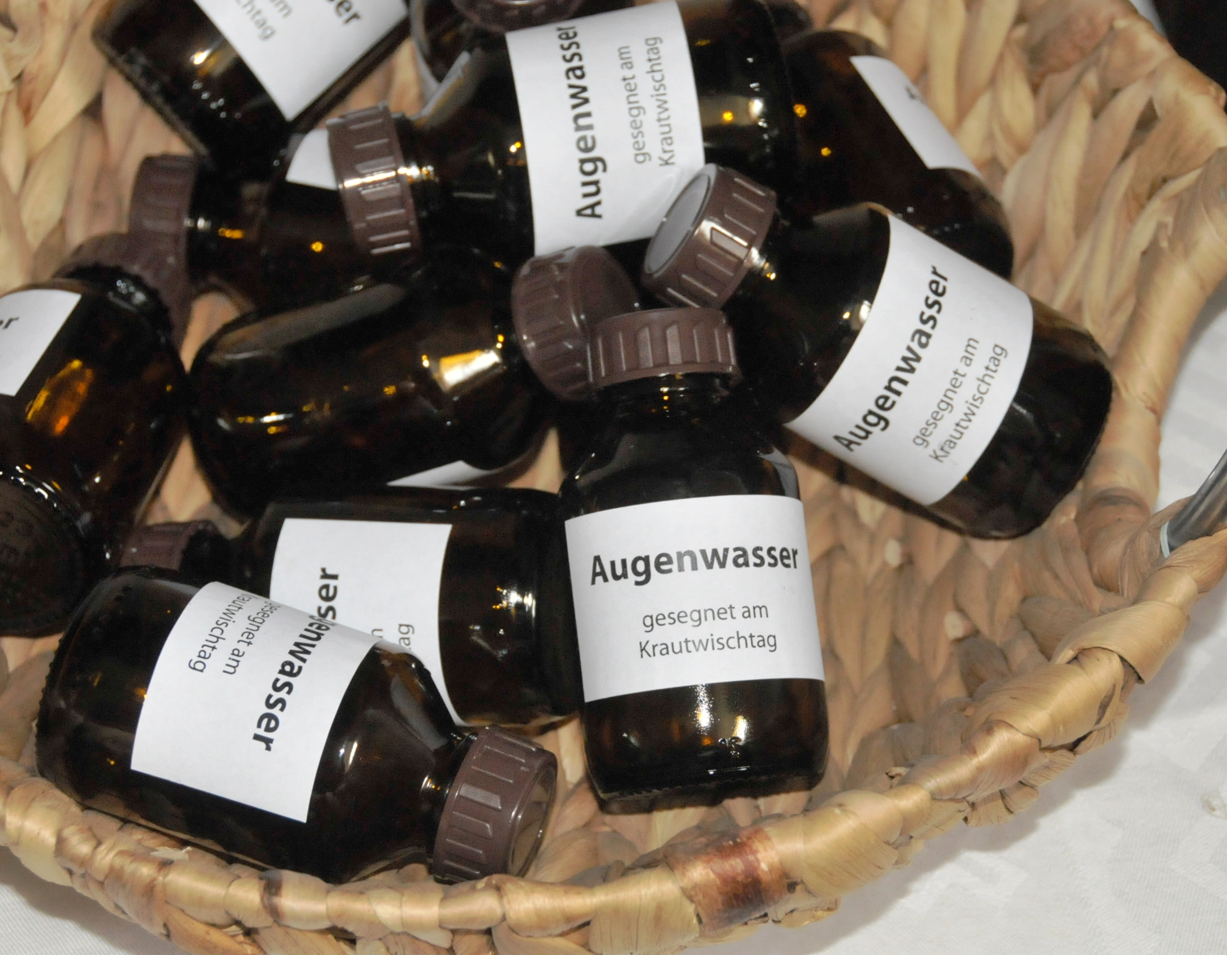 Auw an der Kyll, Mariä-Himmelfahrt-Kirche, leere Fläschchen für das Augenwasser